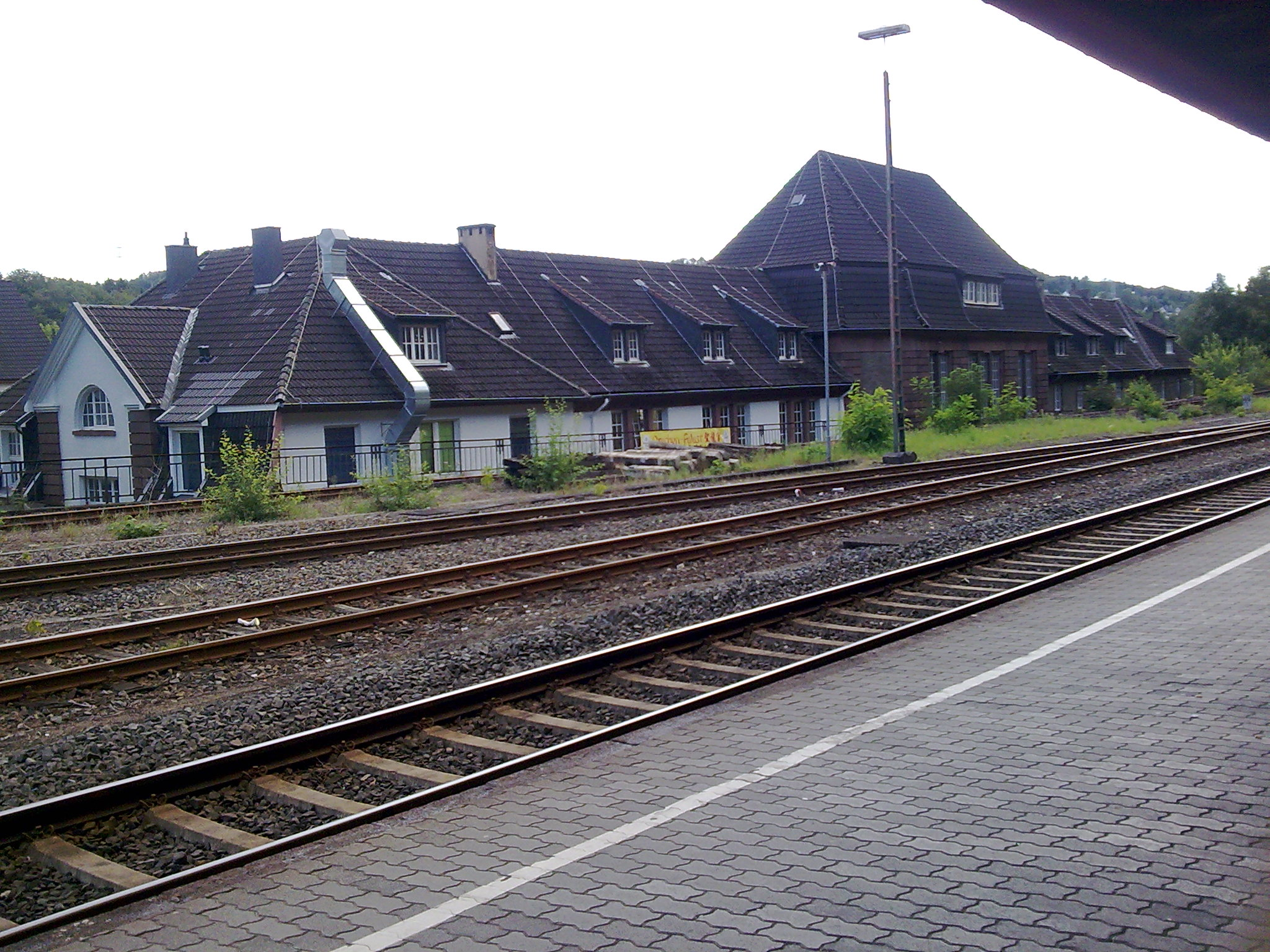 Dieringhausen - Empfangsgebäude vom Bahnsteig aus fotografiert